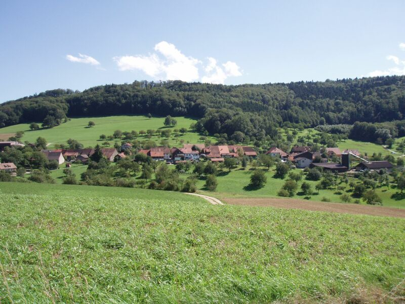 Blick auf Linn, Kanton Aargau, Schweiz